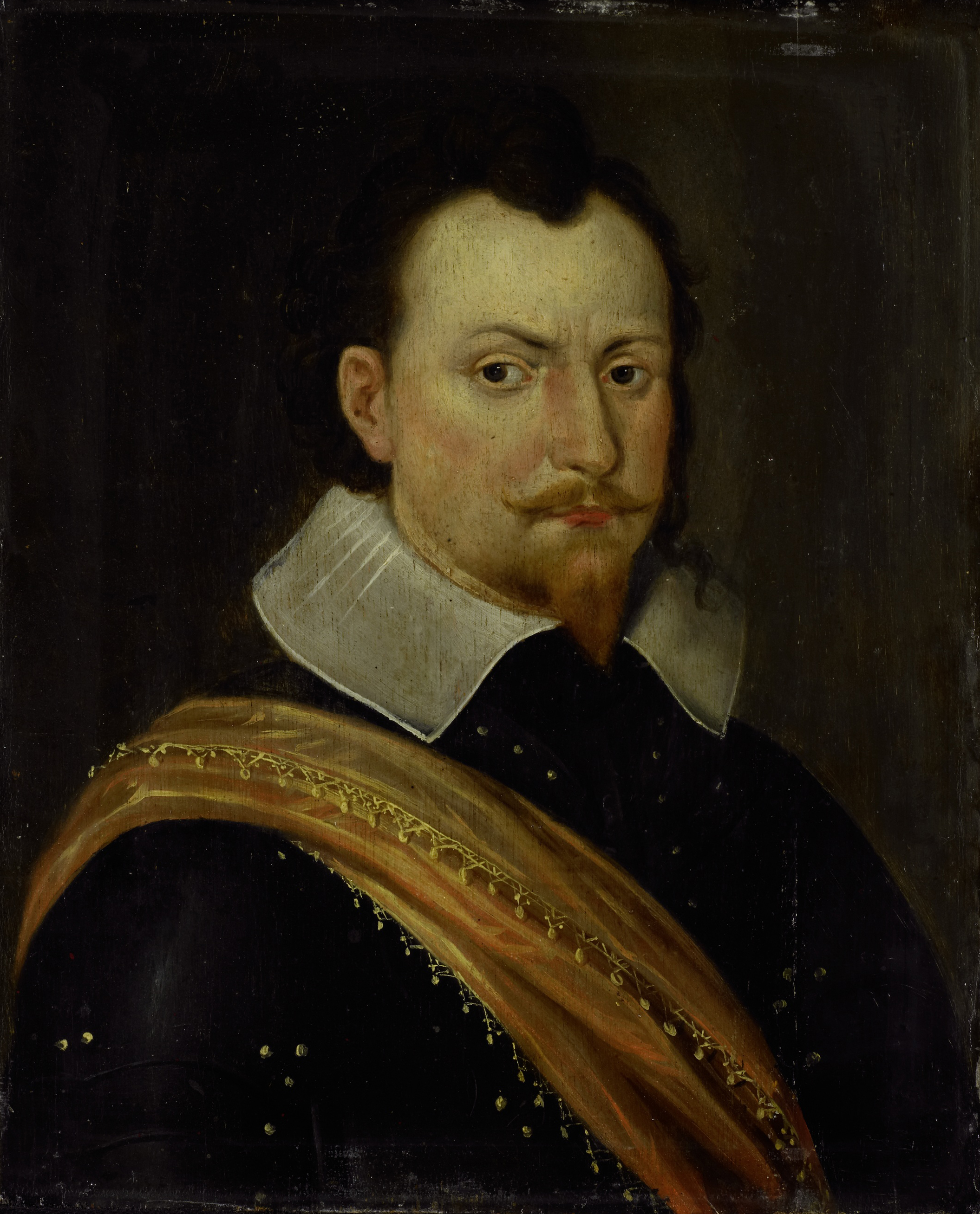 Portret van Lodewijk Hendrik (1594-1661), vorst van Nassau-Dillenburg. Buste naar rechts, in wapenrusting. Onderdeel van de reeks portretten afkomstig uit het huis Honselaarsdijk. Collection: schilderijen; Katzenelnbogen serie